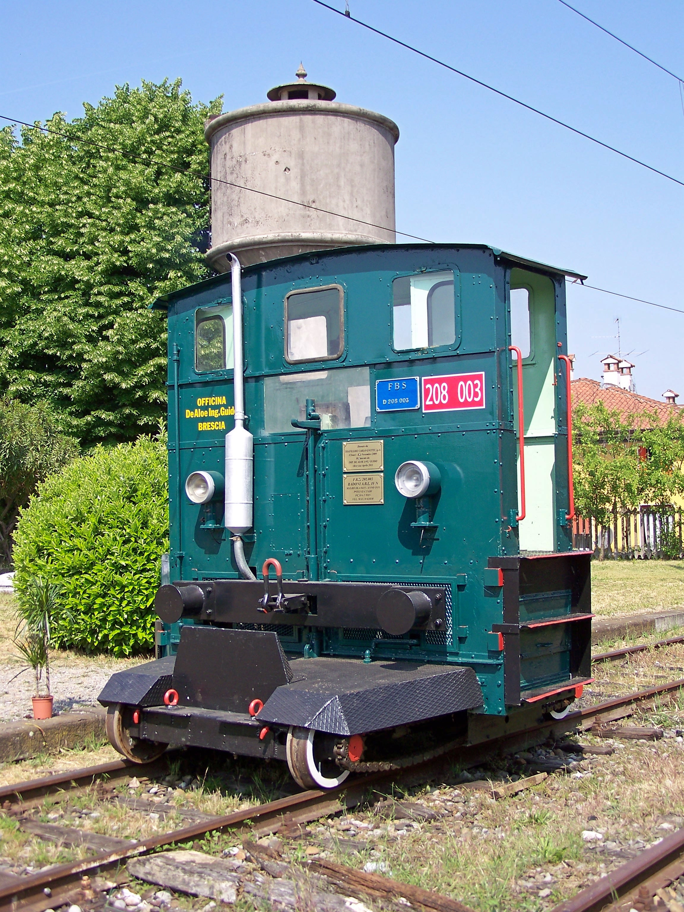 L'automotore ABL IV "Sogliola" ex gruppo FS 208 in esposizione presso il quarto binario della stazione di Palazzolo sull'Oglio dopo essere stato restaurato da un'impresa privata ed essere entrato nel parco delle FTI - Ferrovie Turistiche Italiane come FBS 208.003.